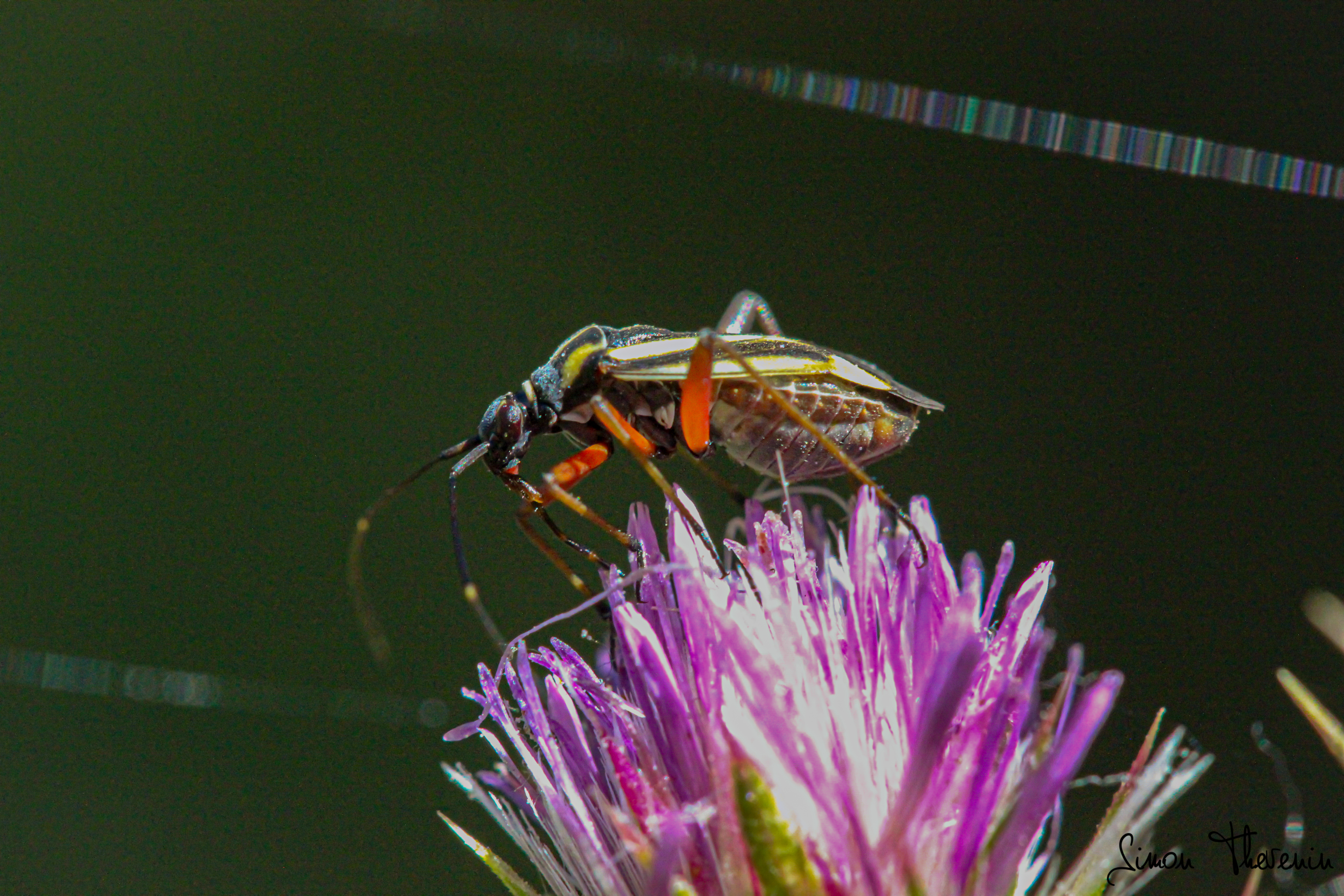 Proxyphotographie d'un Hadrodemus m-flavum se nourrissant sur un Chardon à têtes denses (Carduus pycnocephalus pycnocephalus) prise à Rognes par Simon Thevenin le 24/05/2020